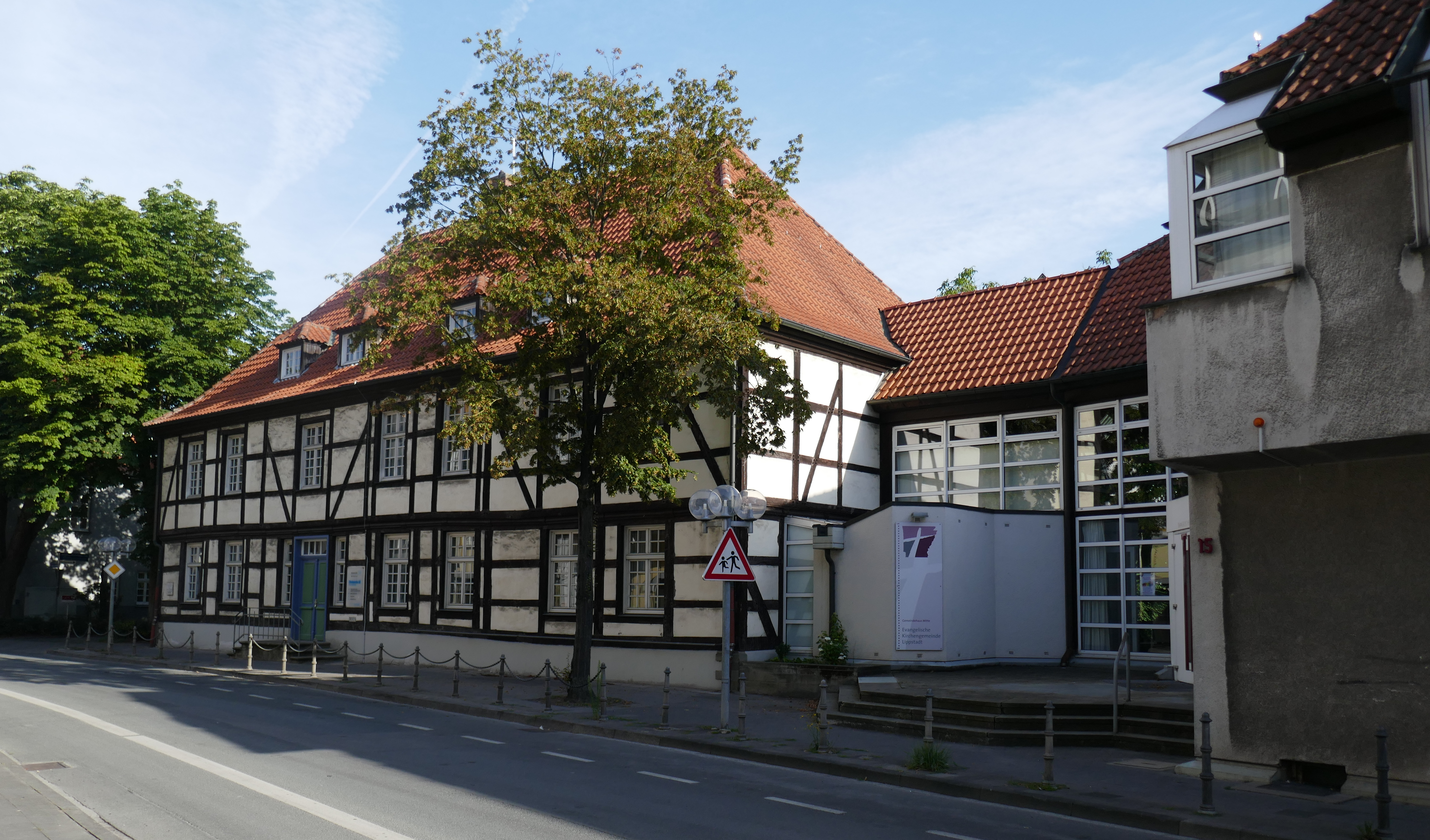 Niemöllerhaus (Brüderstraße 13) in Lippstadt, Geburtshaus von Martin Niemöller